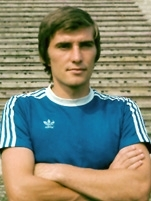 Nicolae Tilihoi